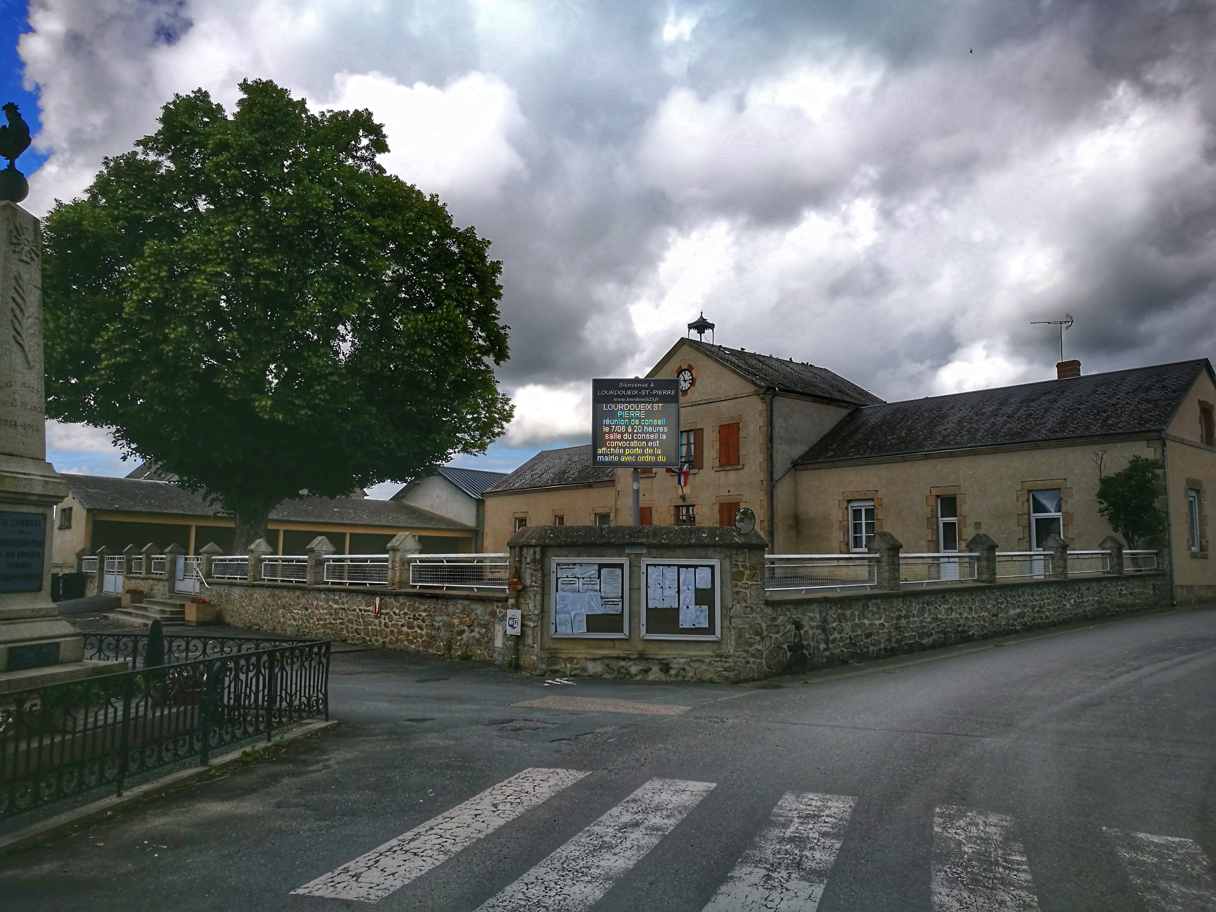 Vue latérale de la cours de l'école de la commune de Lourdoueix-Saint-Pierre, Creuse, France, depuis la Rue Principale.